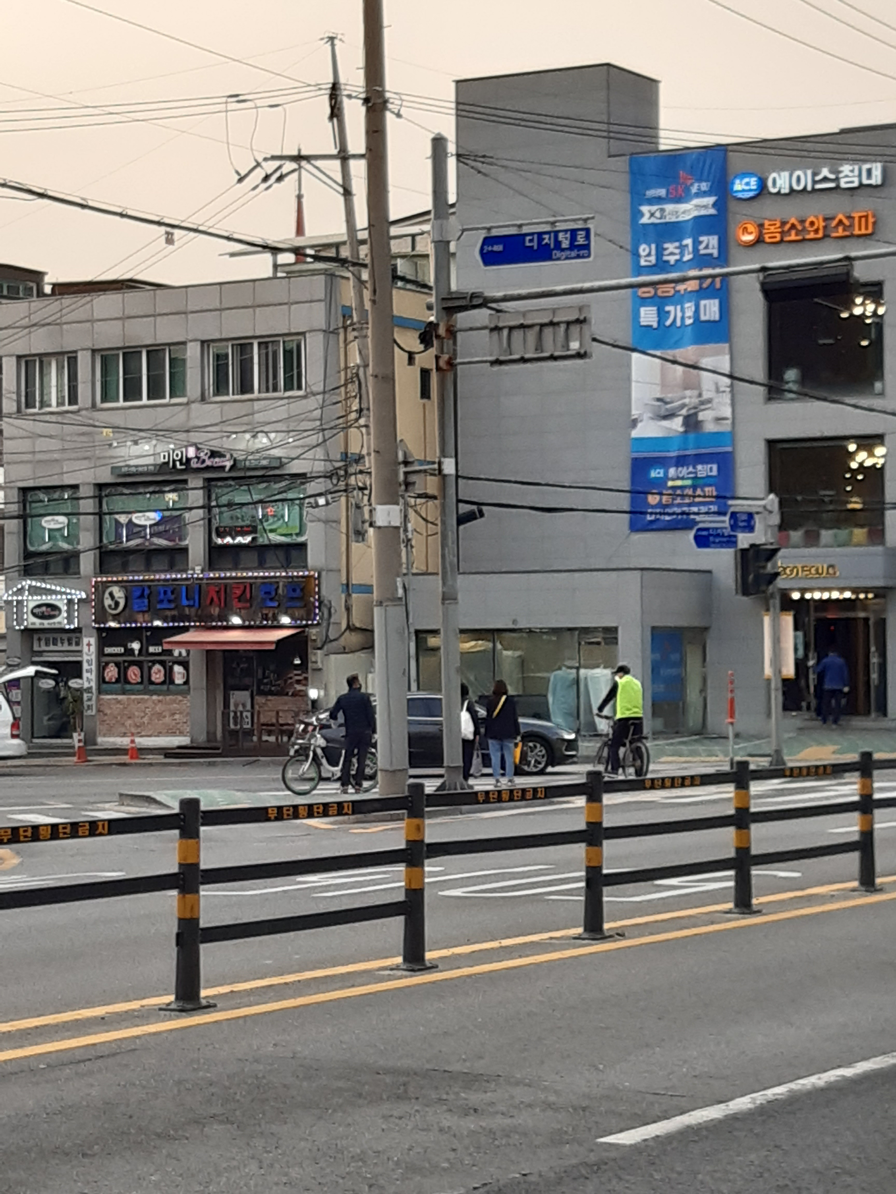 영등포구 대림동 태양의집 삼거리(디지털로 종점)